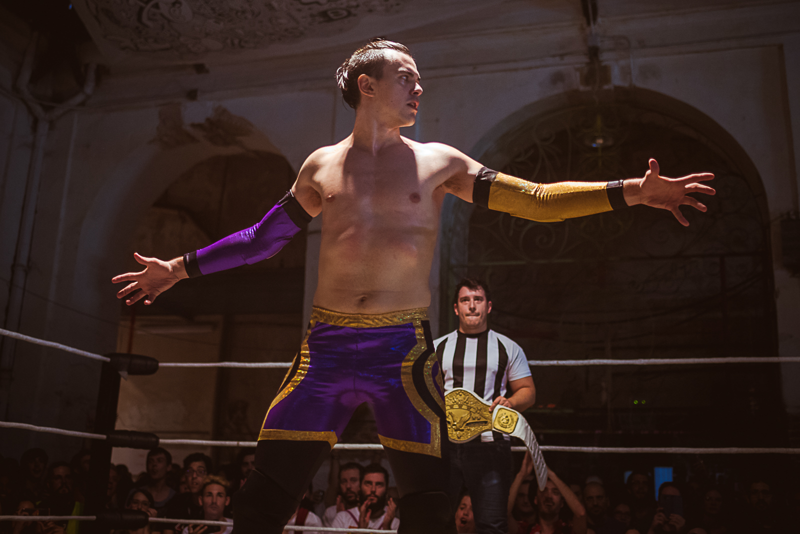 Fotografía tomada por Daniel Alonso. Pueden encontrarse más fotografías como esta en la siguiente cuenta de Instagram: @wrestlingphotoshow